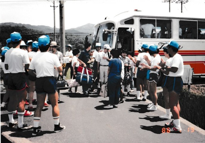 きゅうそキャンプ場前で、キャンパーの出迎えの様子。